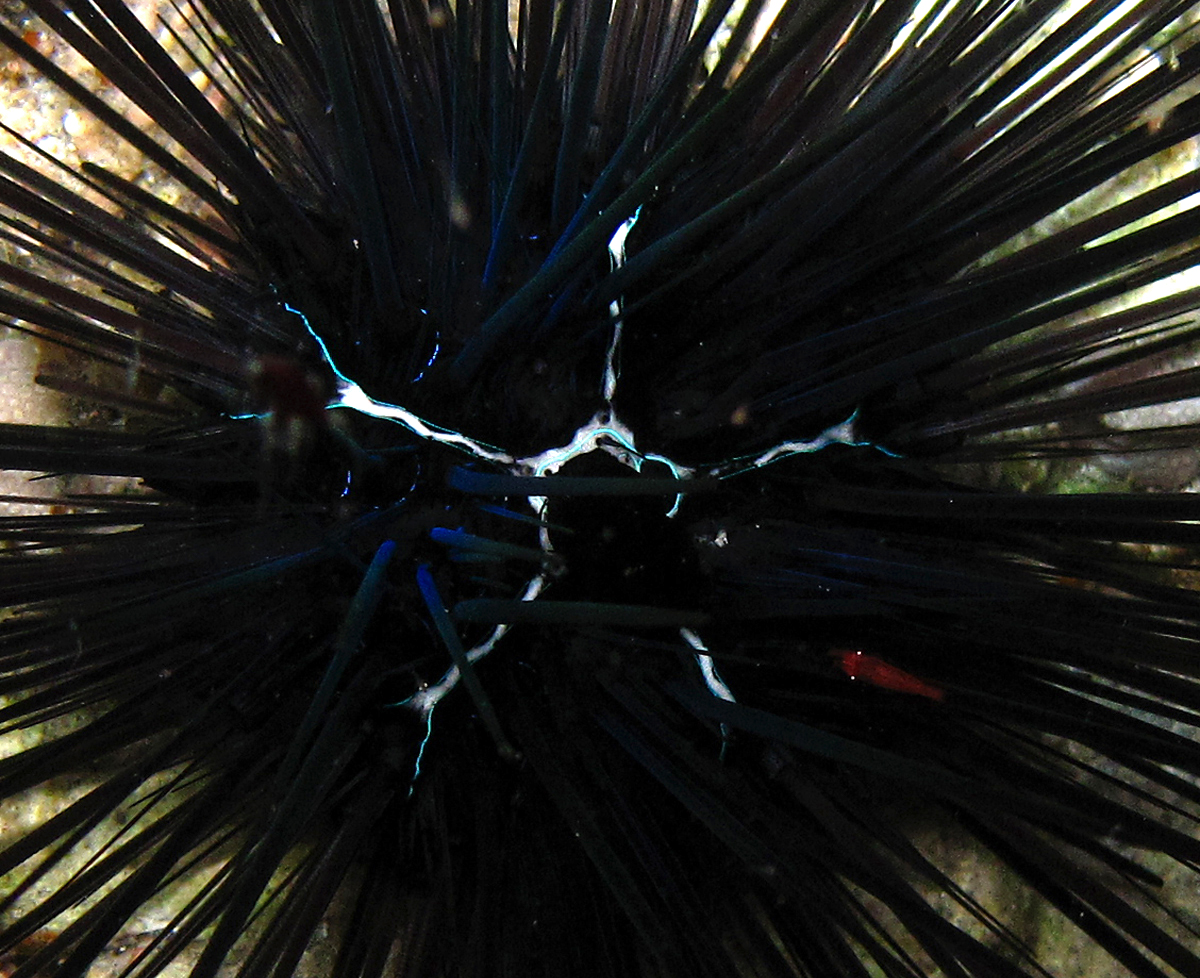 Gros-plan sur un oursin Diadema savignyi avec une crevette commensale du genre Periclimenes (à la Réunion).